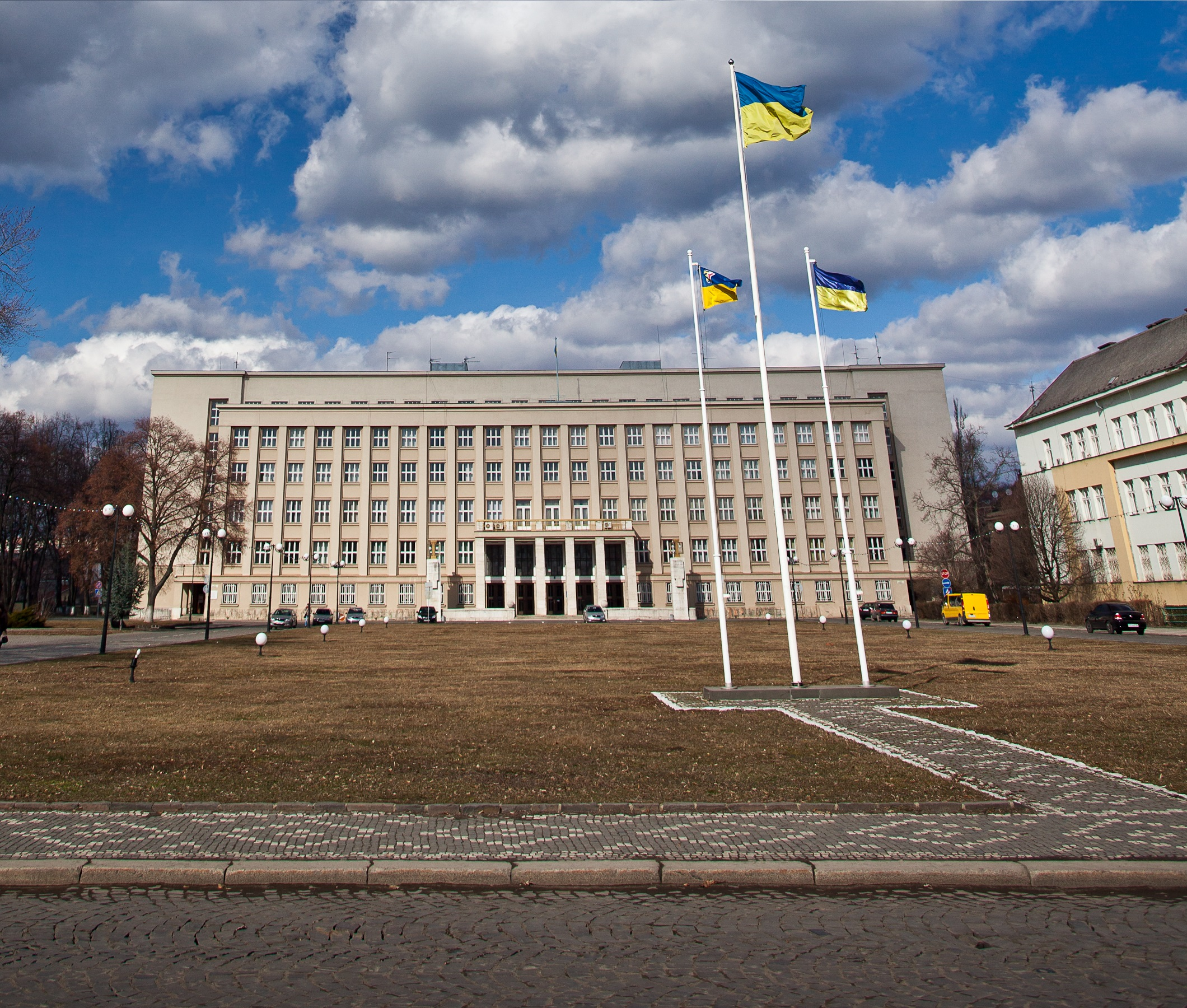 Адмінбудинок (мур.), Ужгород, пл. Народна, 4